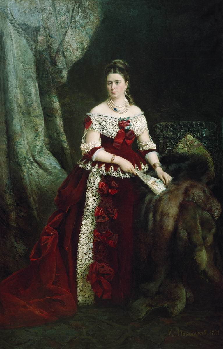 Portrait of Vera Zubovlabel QS:Len,"Portrait of Vera Zubov" label QS:Lru,"Портрет графини Веры Сергеевны Зубовой"